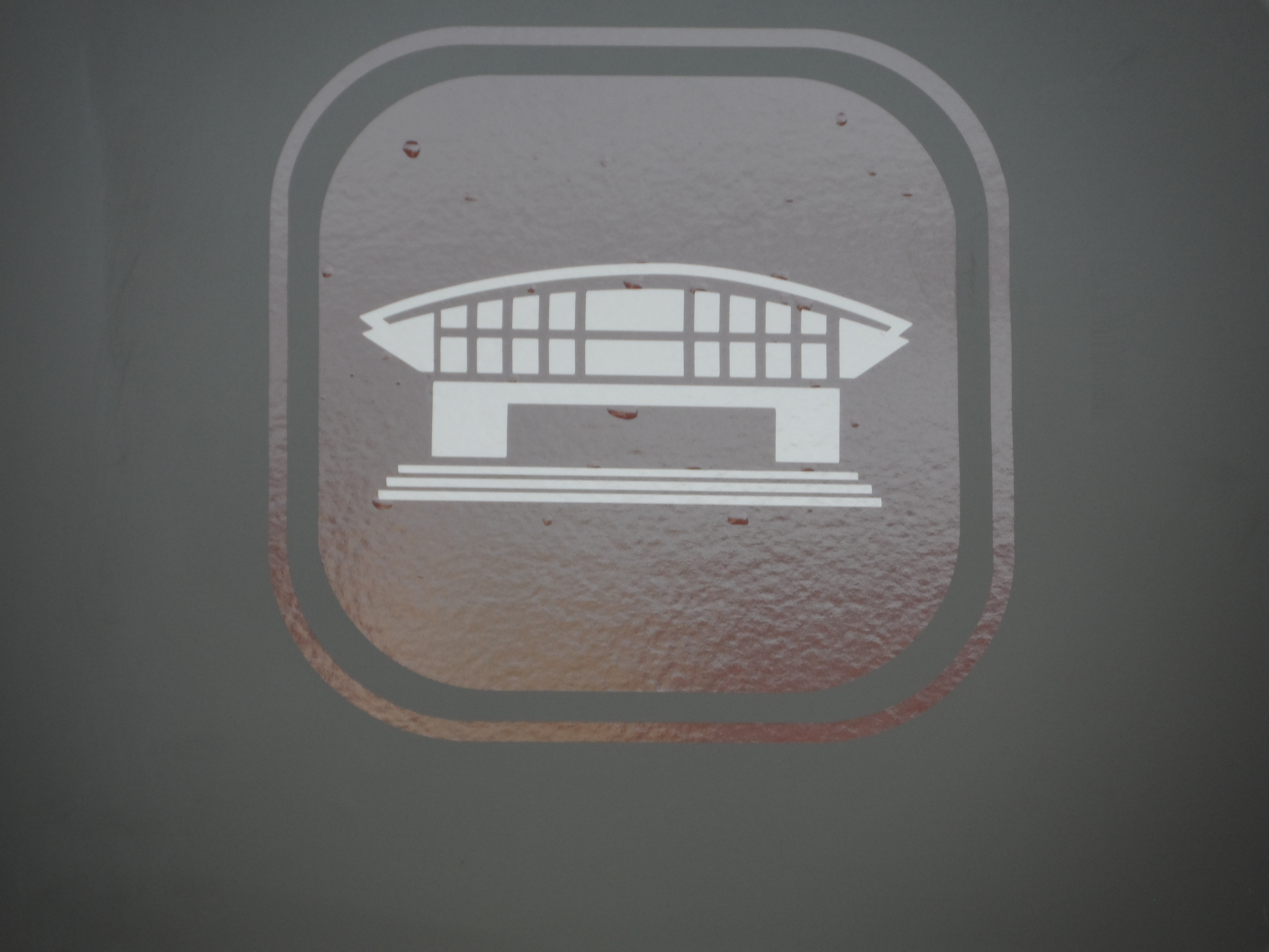 Logotipo de la nueva estación Auditorio de la Línea 1 del Tren Ligero de Guadalajara.